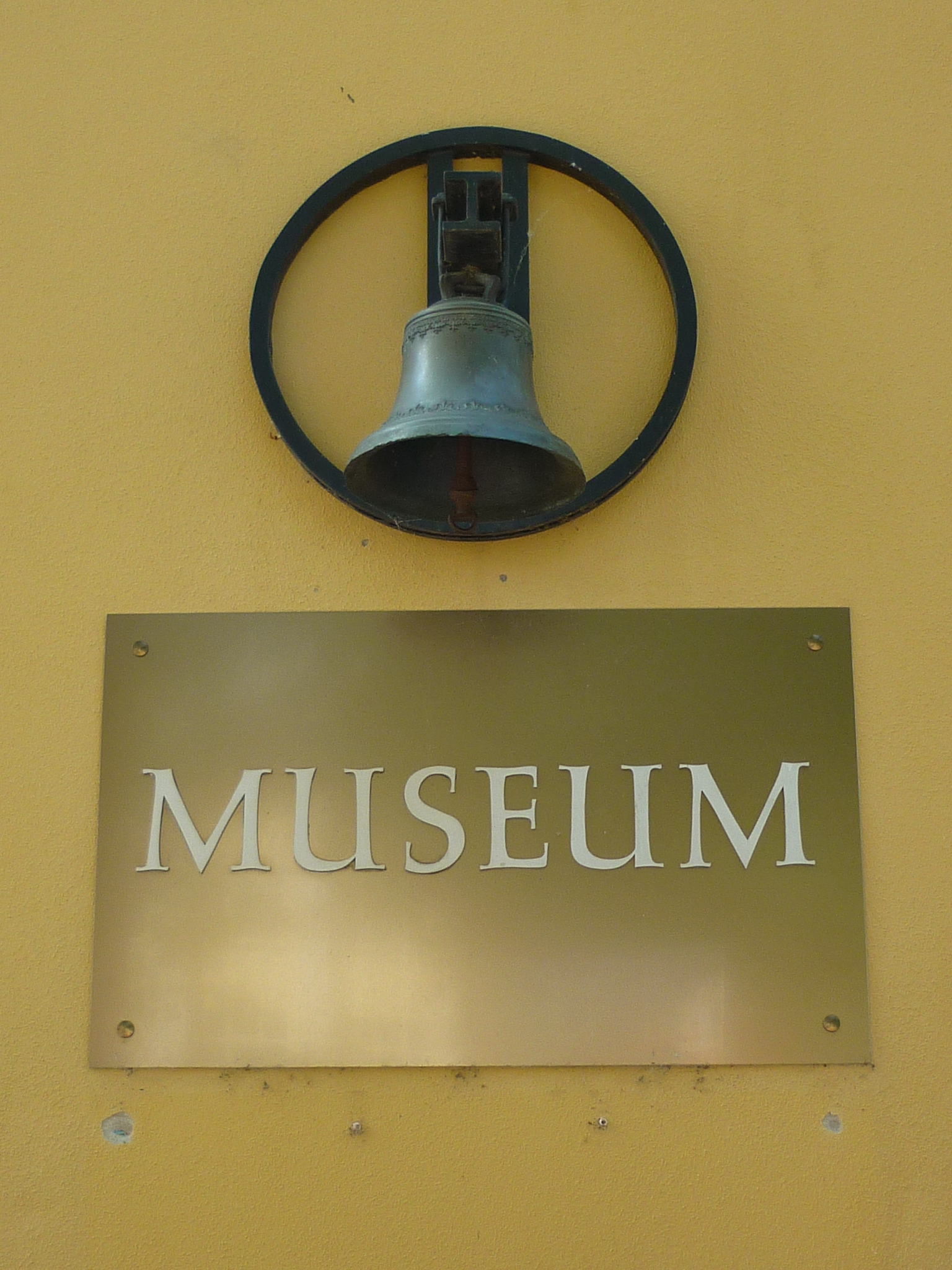 Schild am Hauptgebäude